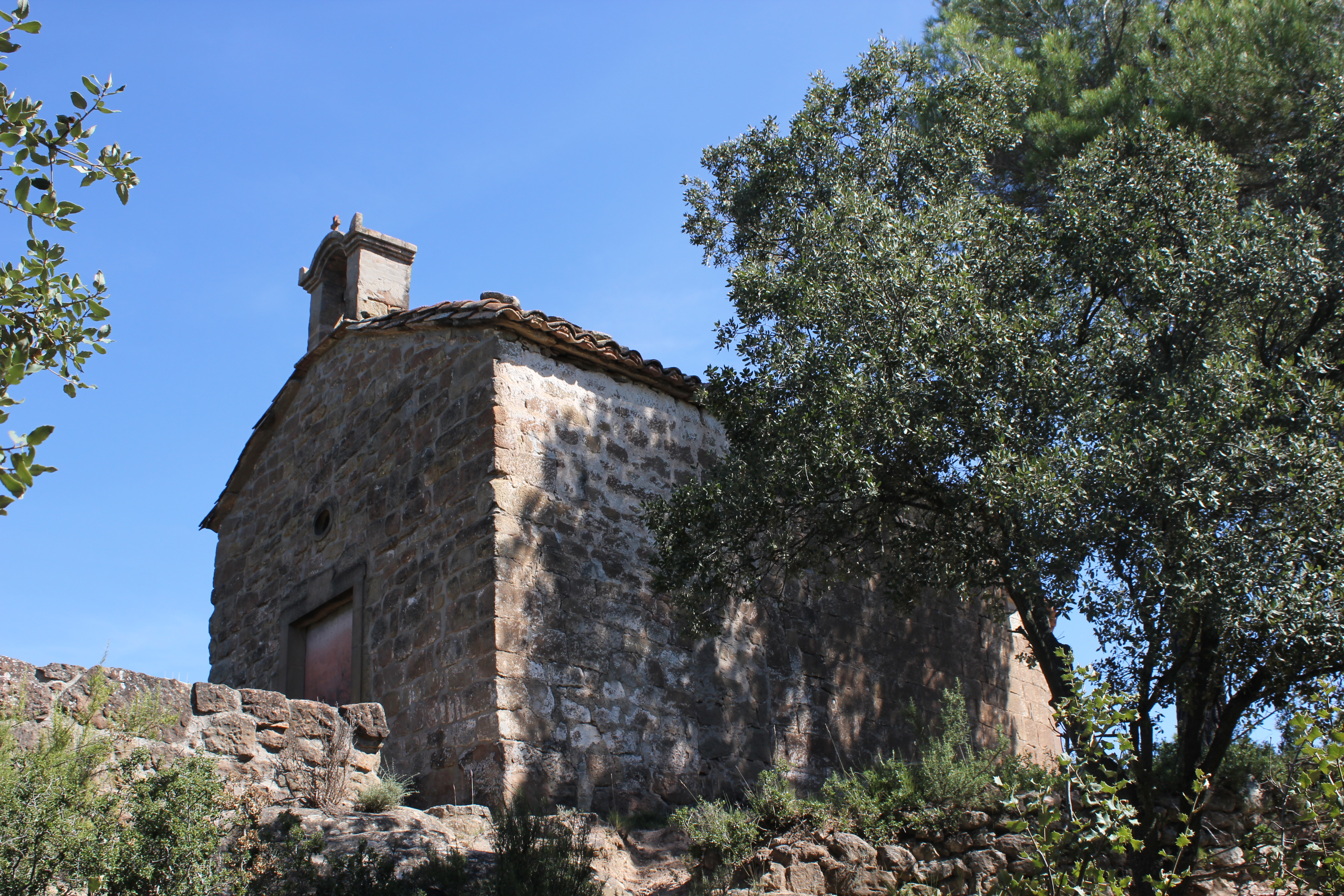 Visió des de sota de la codinera on s'assenta l'ermita de Santa Maria del Vilaró.